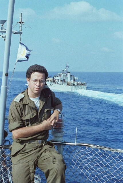 תא"ל יוסי בן-חנן ראש מחלקת תורת לחימה שהצטרף לספינת הפיקוד וולכח הנוחת.